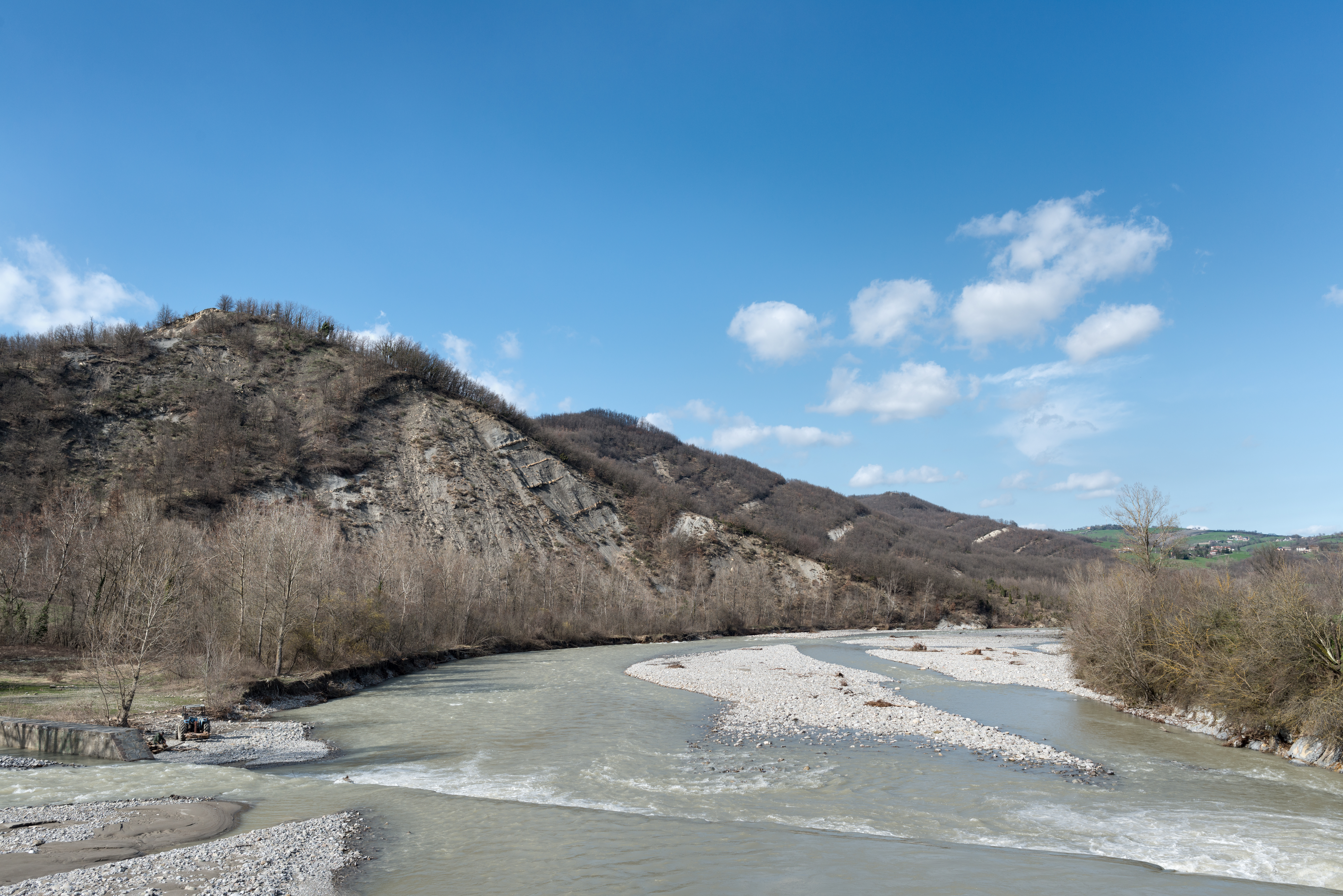 Fiume Enza - Canossa, Reggio Emilia, Italia